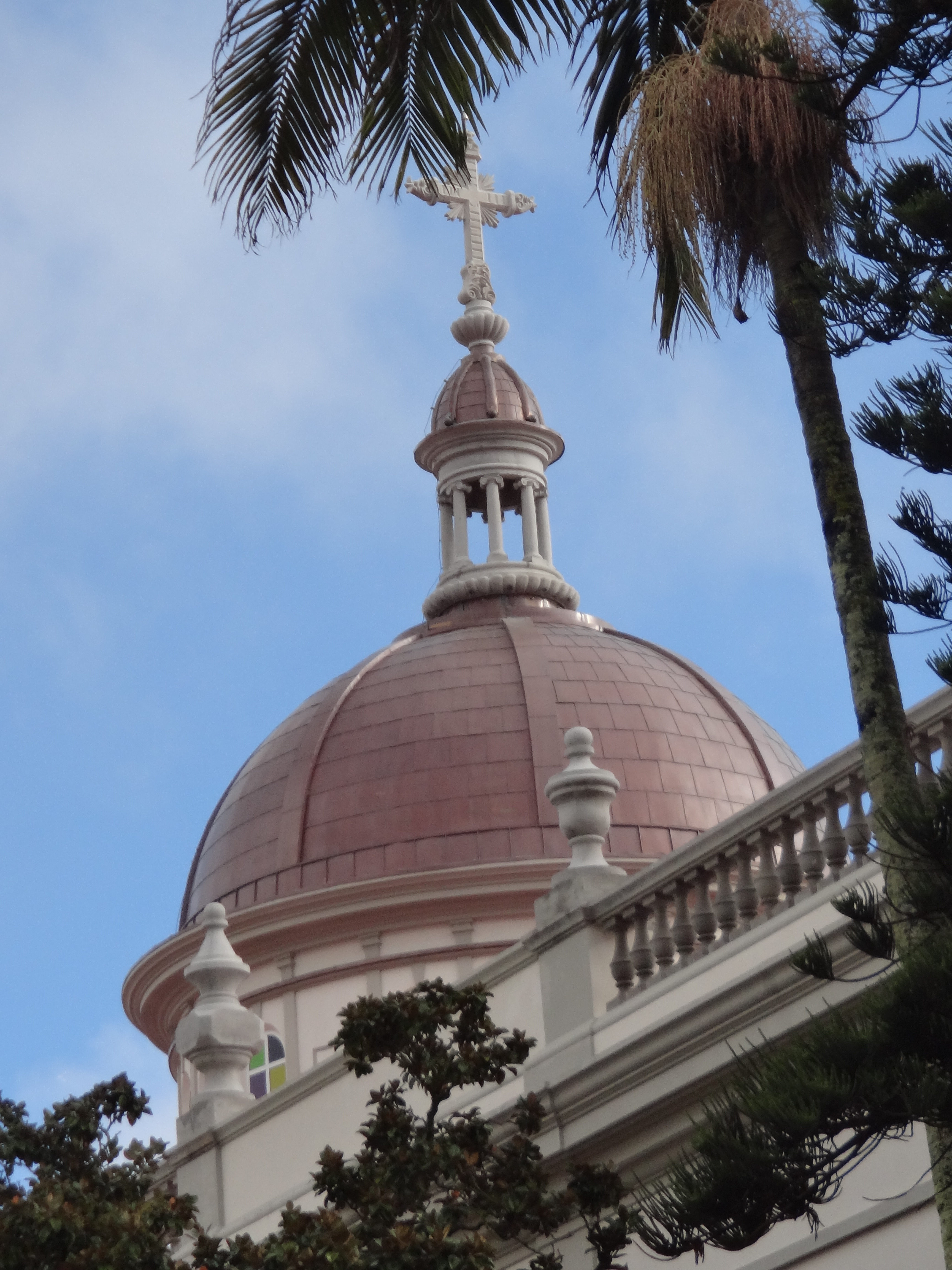 San Cristóbal de La Laguna, Santa Cruz de Tenerife, Spain